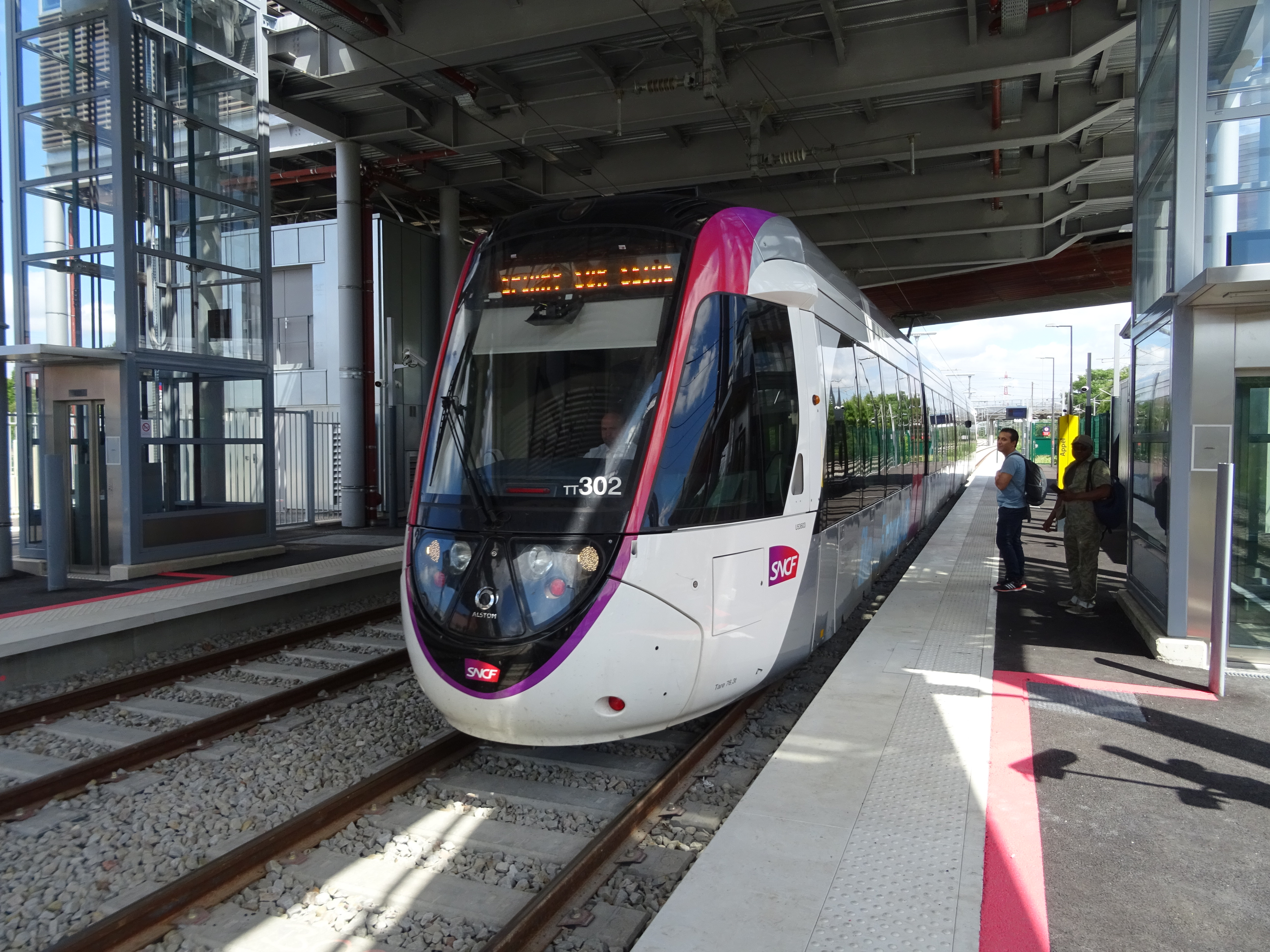 Citadis Dualis en gare de Villetaneuse-Université